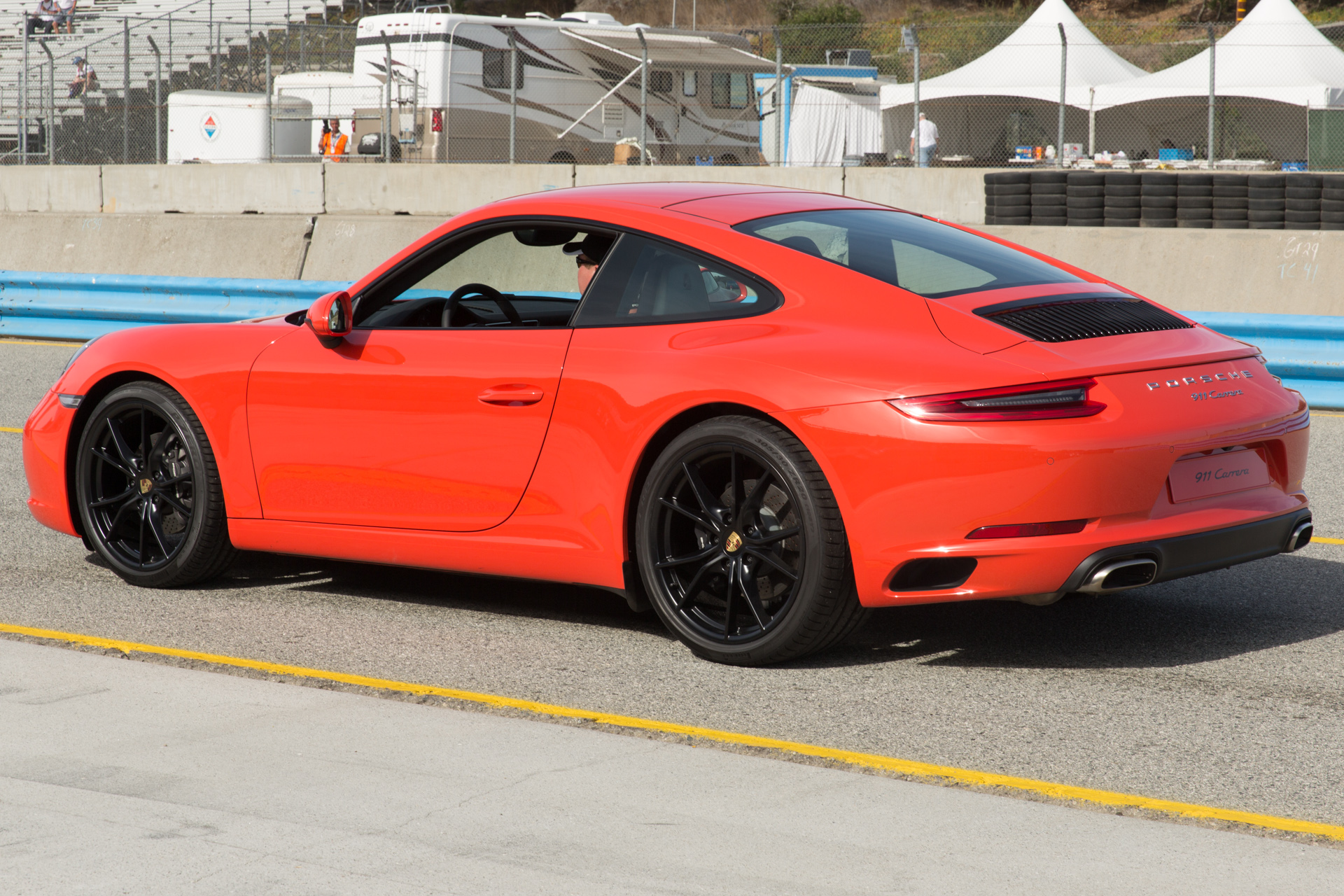 Rennsport Reunion V